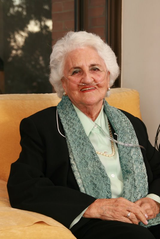 Description= Elvira Dávila Ortiz Source="trabajo propio" Author= "trabajo propio"